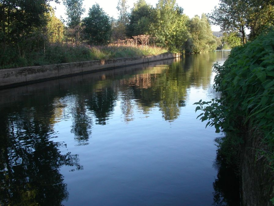 Rote_Mühle_Schleuse